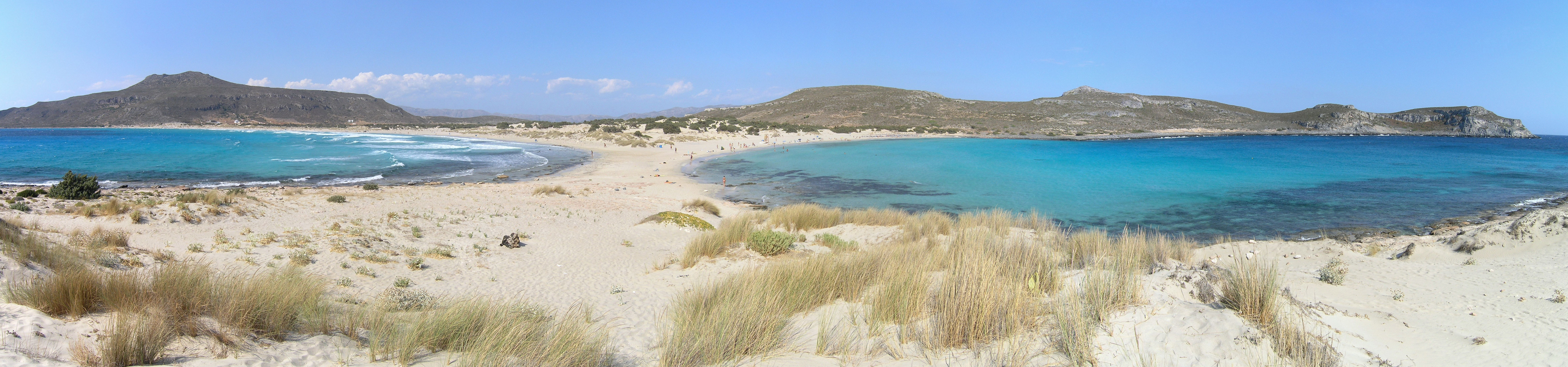 Elafonissos - Strand von Simos, Extrem-Panorama, zusammengesetzt aus 10 Einzelbildern